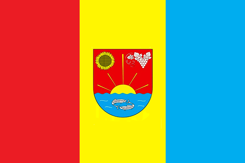 Прапор села Владичень